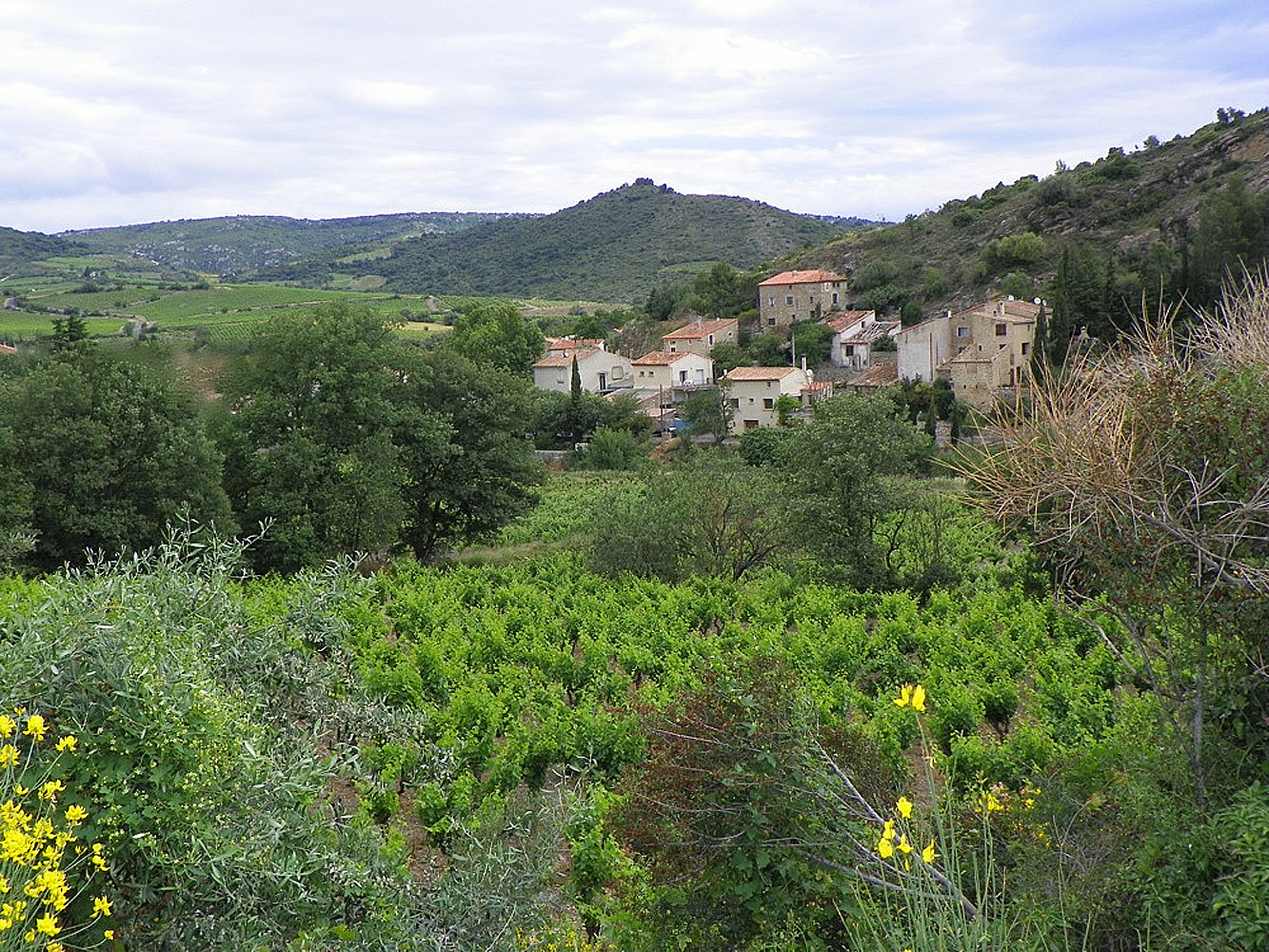 Vue de Villeneuve-les-Corbières et de ses vignes